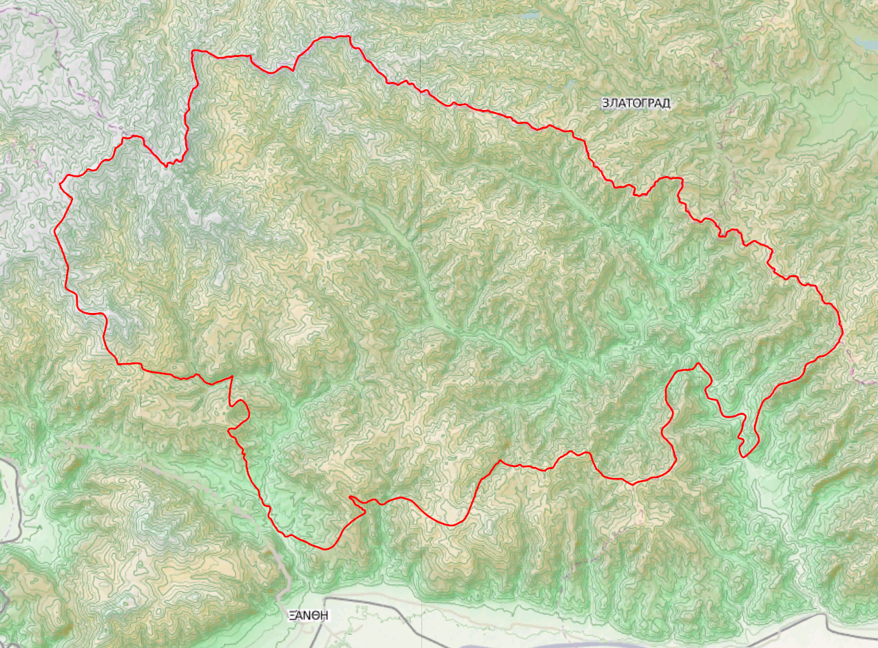 Τοπογραφικός χάρτης του Δήμου Μύκης.